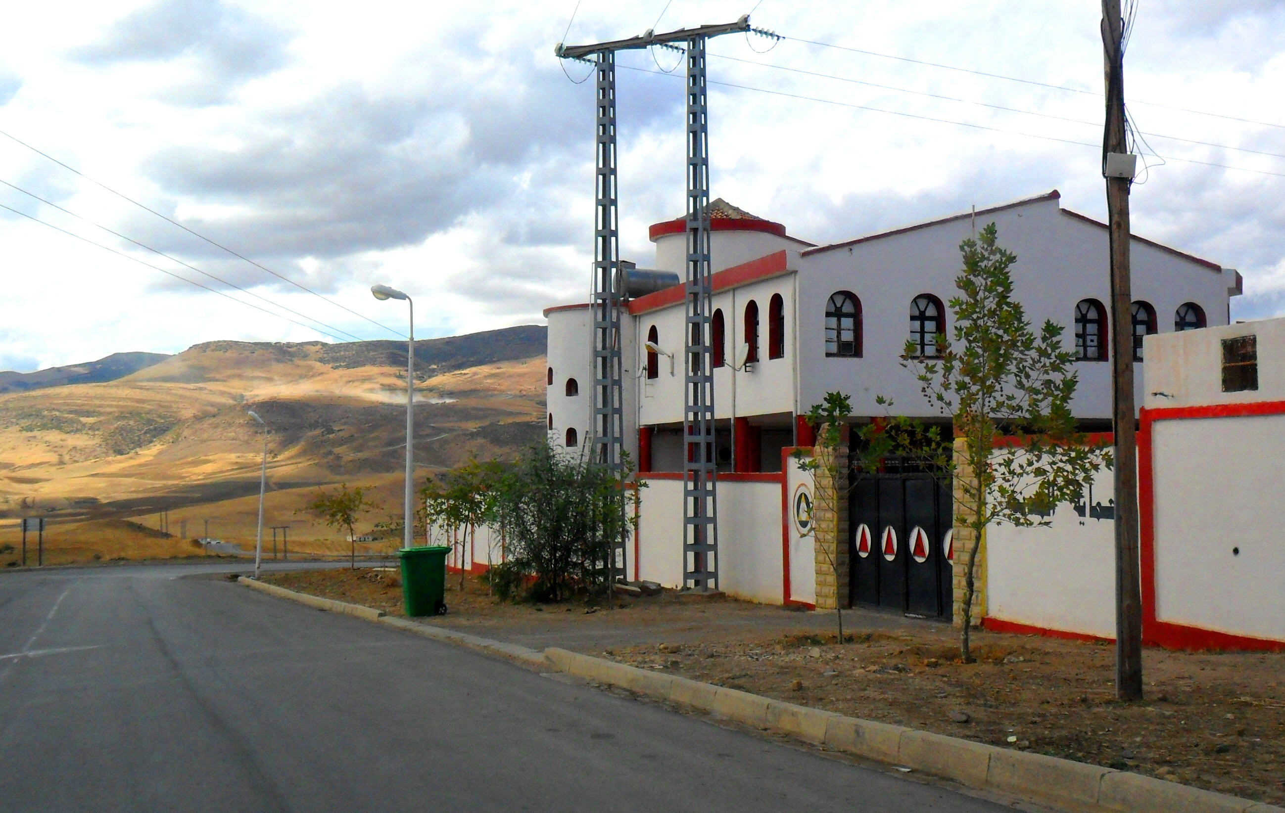 Taza - protection civile الحماية المدنية